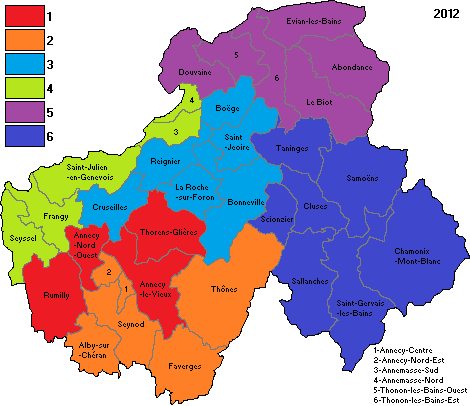 Circonscriptions de la Haute-Savoie en 2012